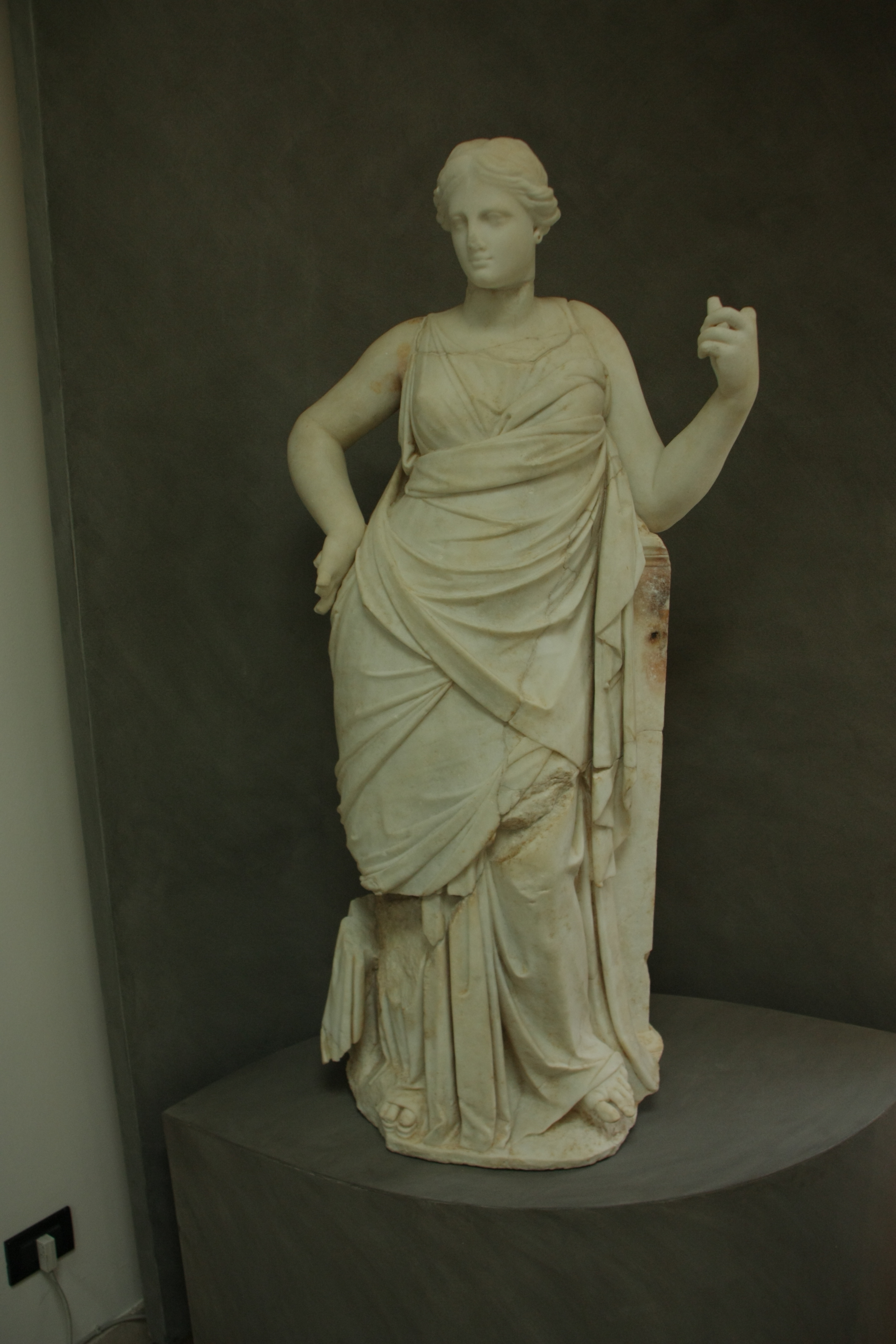 Statua di musa con rotolo, casa di Leda II a.C.